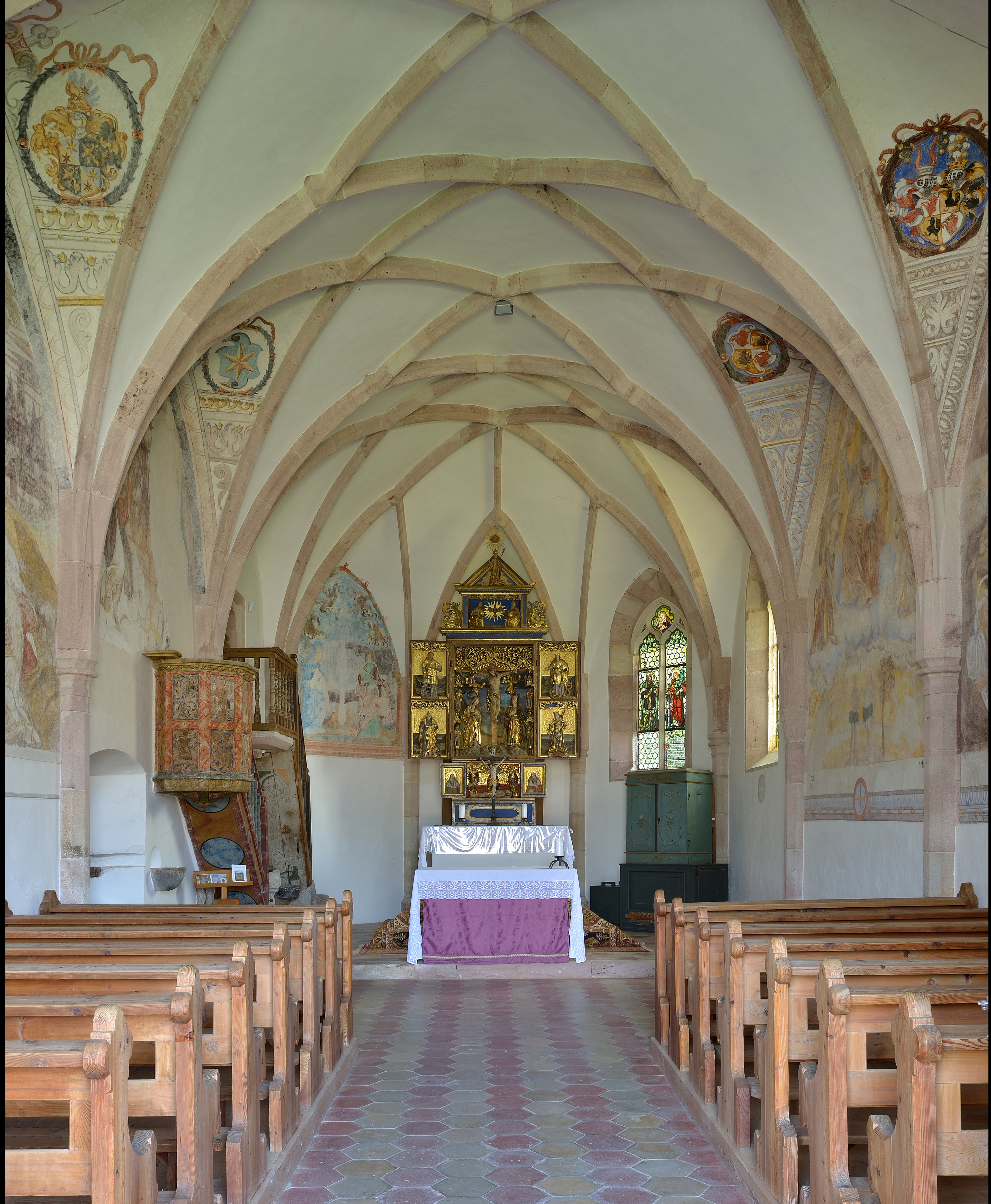 Obervöls a. Schlern (Gmde. Völs a. Schlern), Filialkirche St. Margareth, Innenraum mit Blick zum Chor.